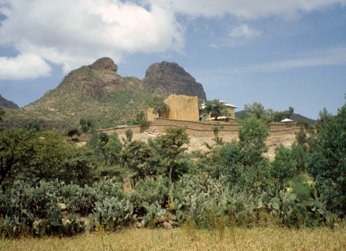 Tempel von Yeha, Rückseite, daneben eine aksumitische Kirche